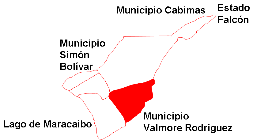 Ubicación de la parroquia Campo Lara en el municipio Lagunillas, estado Zulia, Venezuela